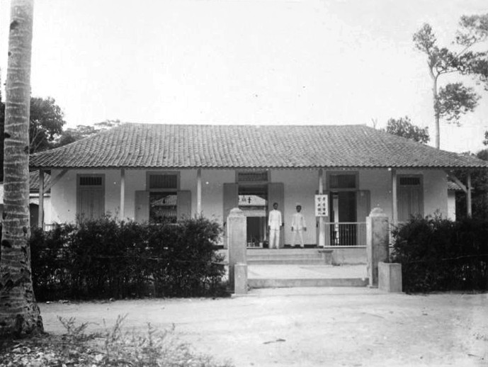 foto. De Tiong hoa hwe Kwan school in Soengailiat